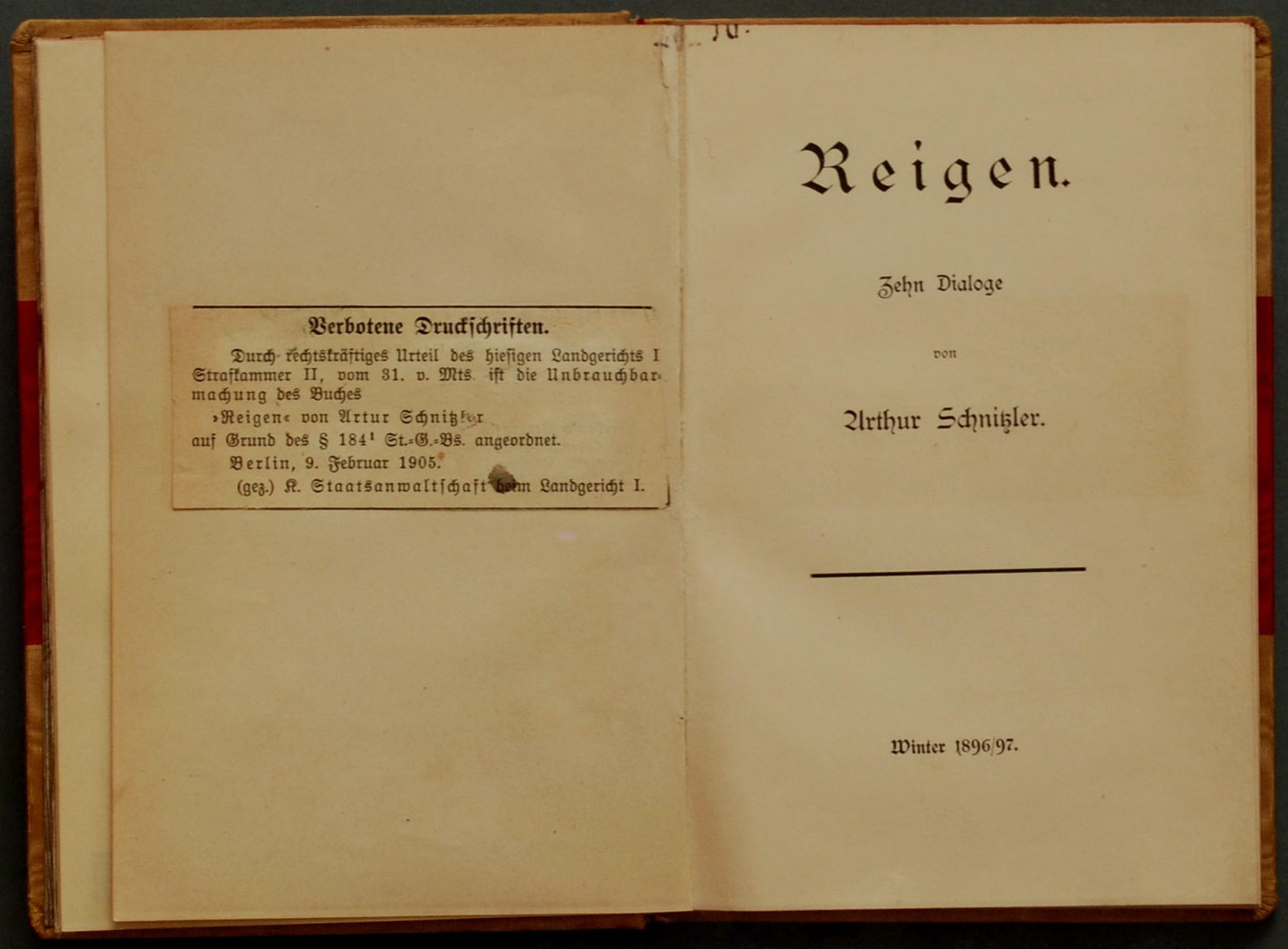 Schnitzler, Arthur: Reigen. Zehn Dialoge. [Entstanden] Winter 1896/97 [Komödie] [Verbotener, indexierter Erstdruck von 1900] Als Manuskript gedruckt [in einer Auflage von 200 Exemplaren, nicht für den Handel vorgesehen]. Druckvermerk letzte Seite: Buchdruckerei Roitzsch vorm. Otto Noack Co.